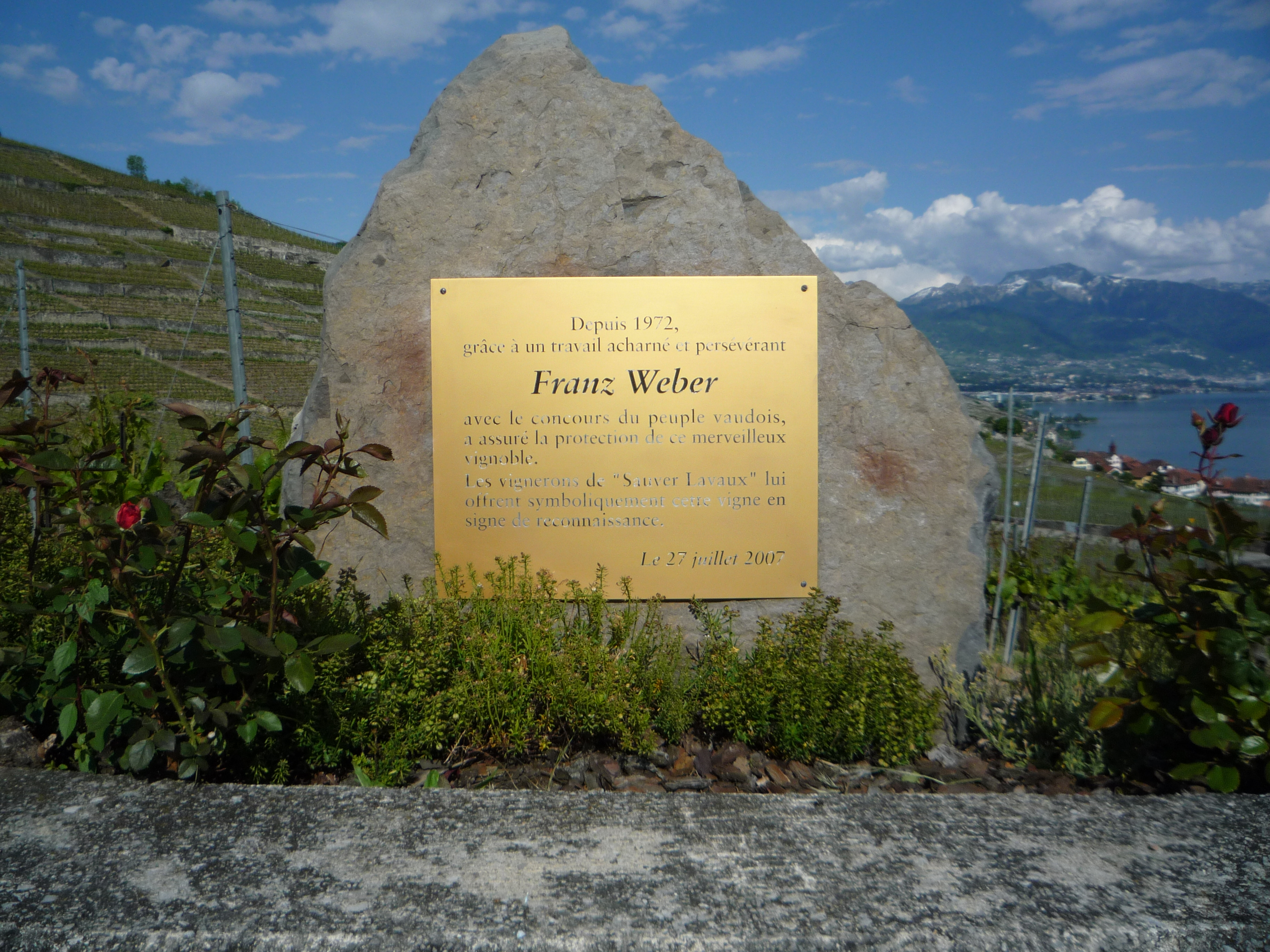 Cette plaque commémorative se trouve dans le village de Puidoux, au chemin de la Dame, dans le vignoble de Lavaux, en Suisse. Elle a été apposée en signe de reconnaissance, pour les deux initiatives populaires Sauvez Lavaux, acceptées par le peuple en 1977 et en 2005, qui ont contribué à protéger les vignobles de Lavaux. Le 28 juin 2007, les vignobles de Lavaux ont été inscrites au patrimoine mondial de l'UNESCO. L'inscription est la suivante : Depuis 1972, grâce à un travail acharné et persévérant Franz Weber avec le concours du peuple vaudois, a assuré la protection de ce merveilleux vignoble. Les vignerons de "Sauvez Lavaux" lui offre symboliquement cette vigne en signe de reconnaissance. Le 27 juillet 2007